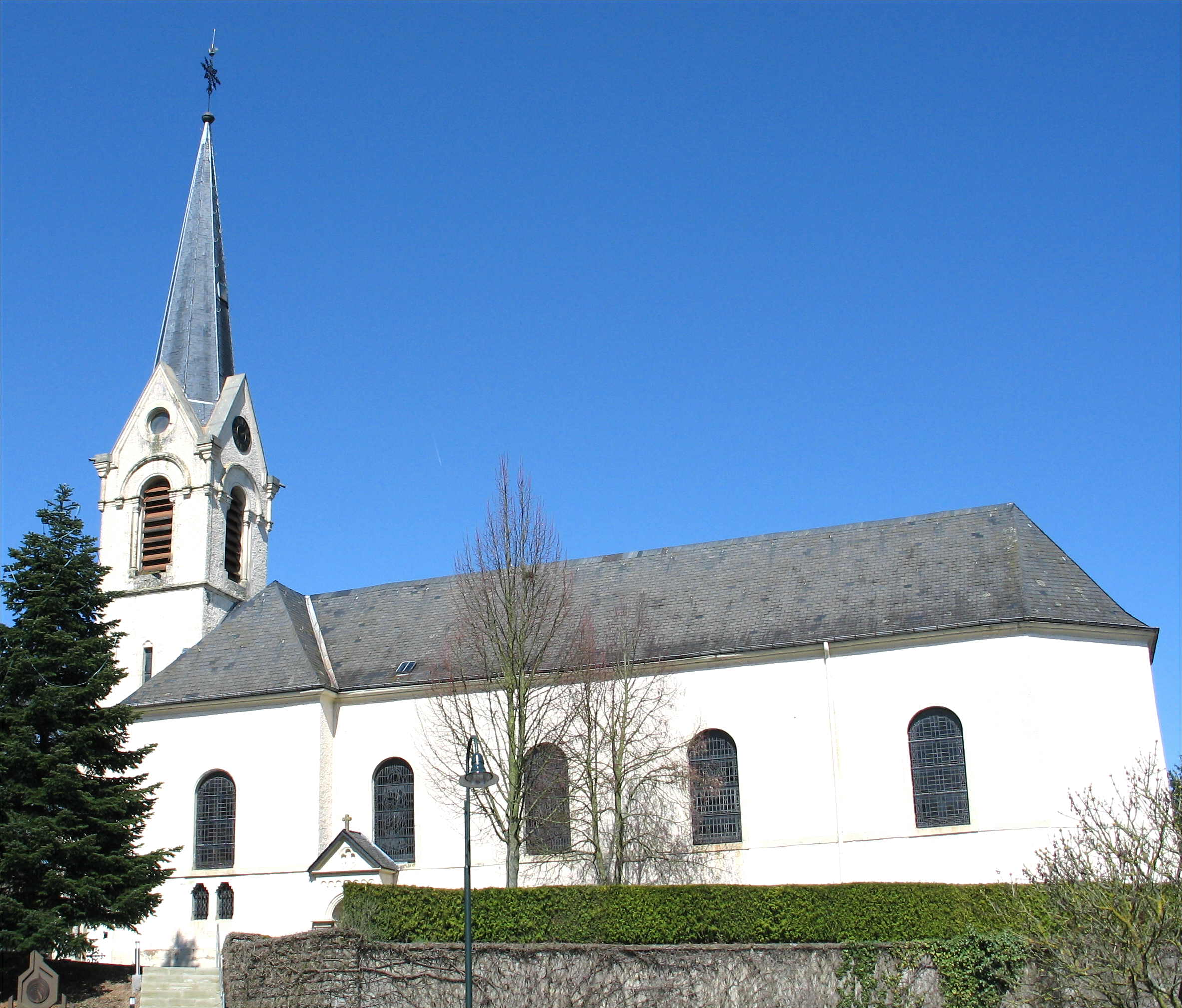 L'église de Waldbillig (Luxembourg)